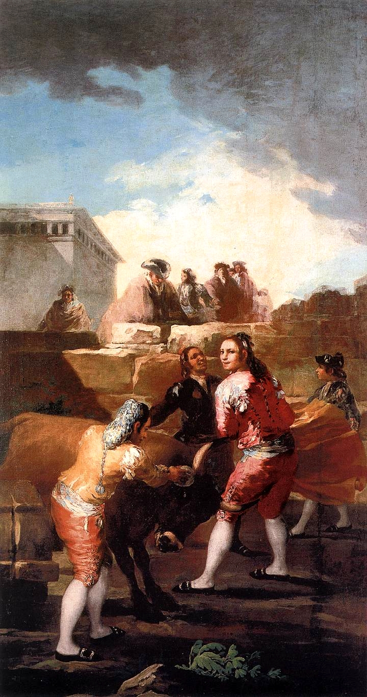 La novillada.label QS:Les,"La novillada."